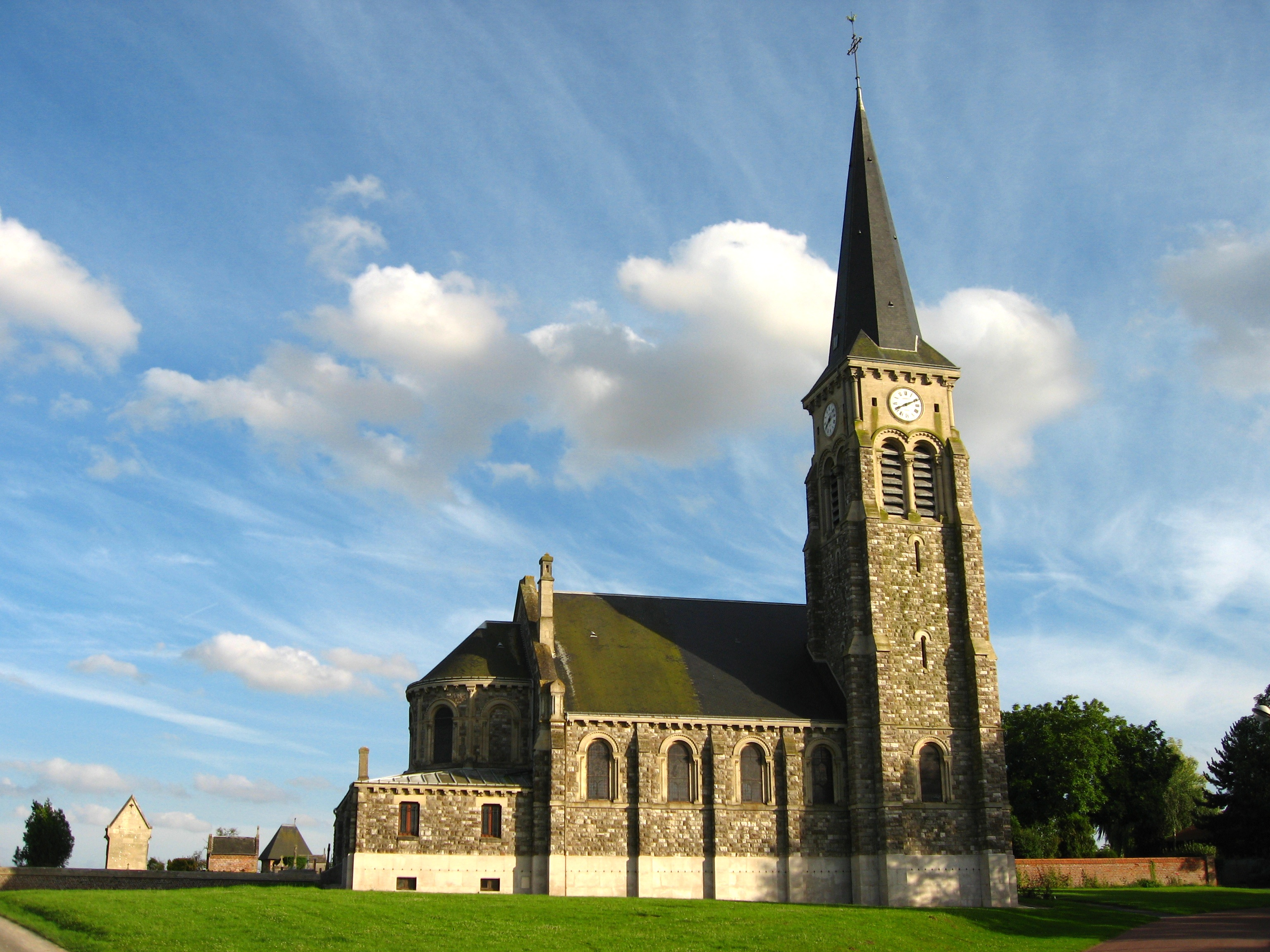 L'Eglise Saint-Nicolas de Coullemelle (Somme) .